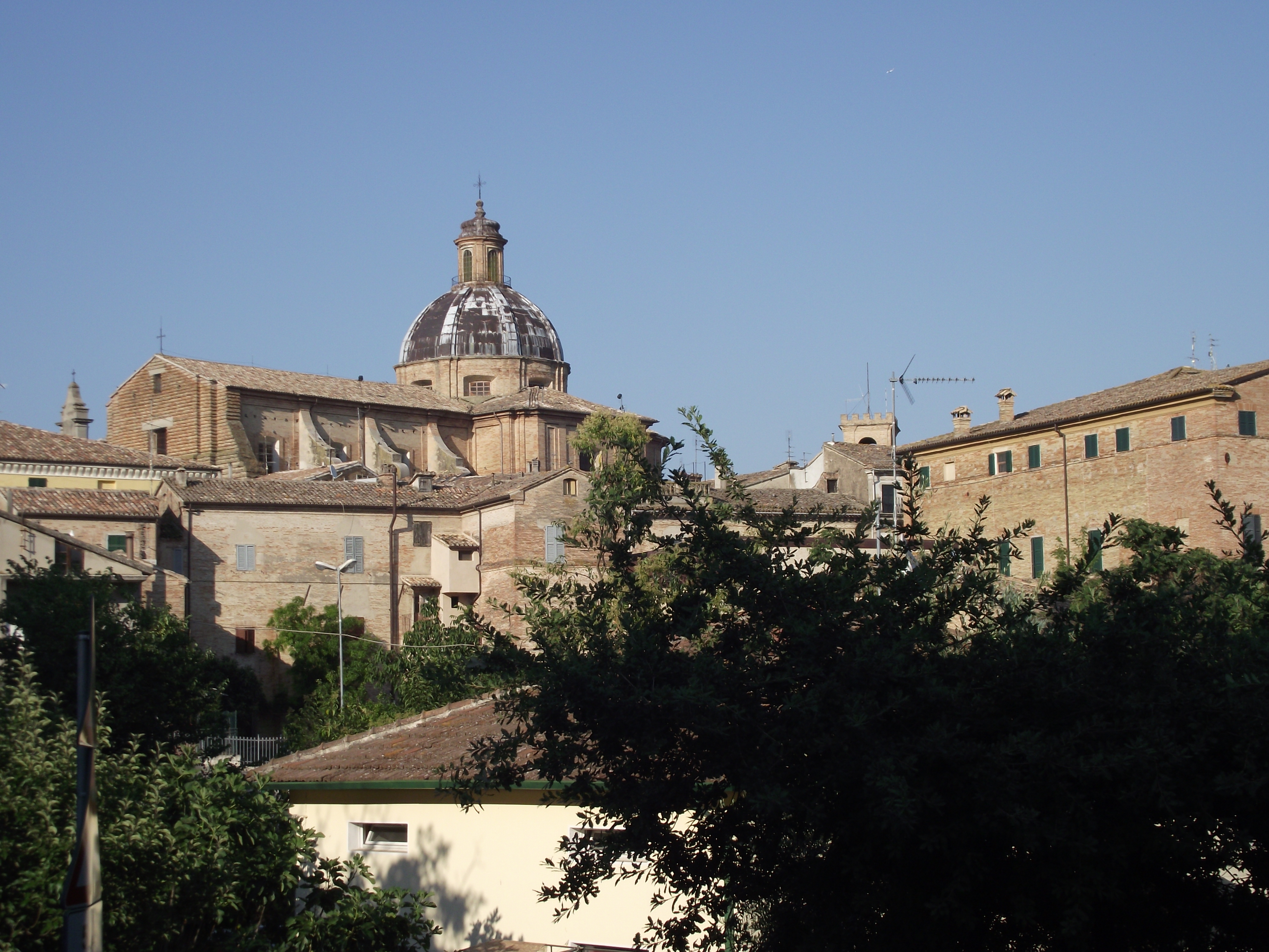 Monte San Vito, panorama